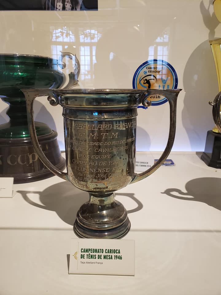 Troféu do Campeonato Carioca de Tênis de Mesa de 1946 conquistado pelo Fluminense Football Club.